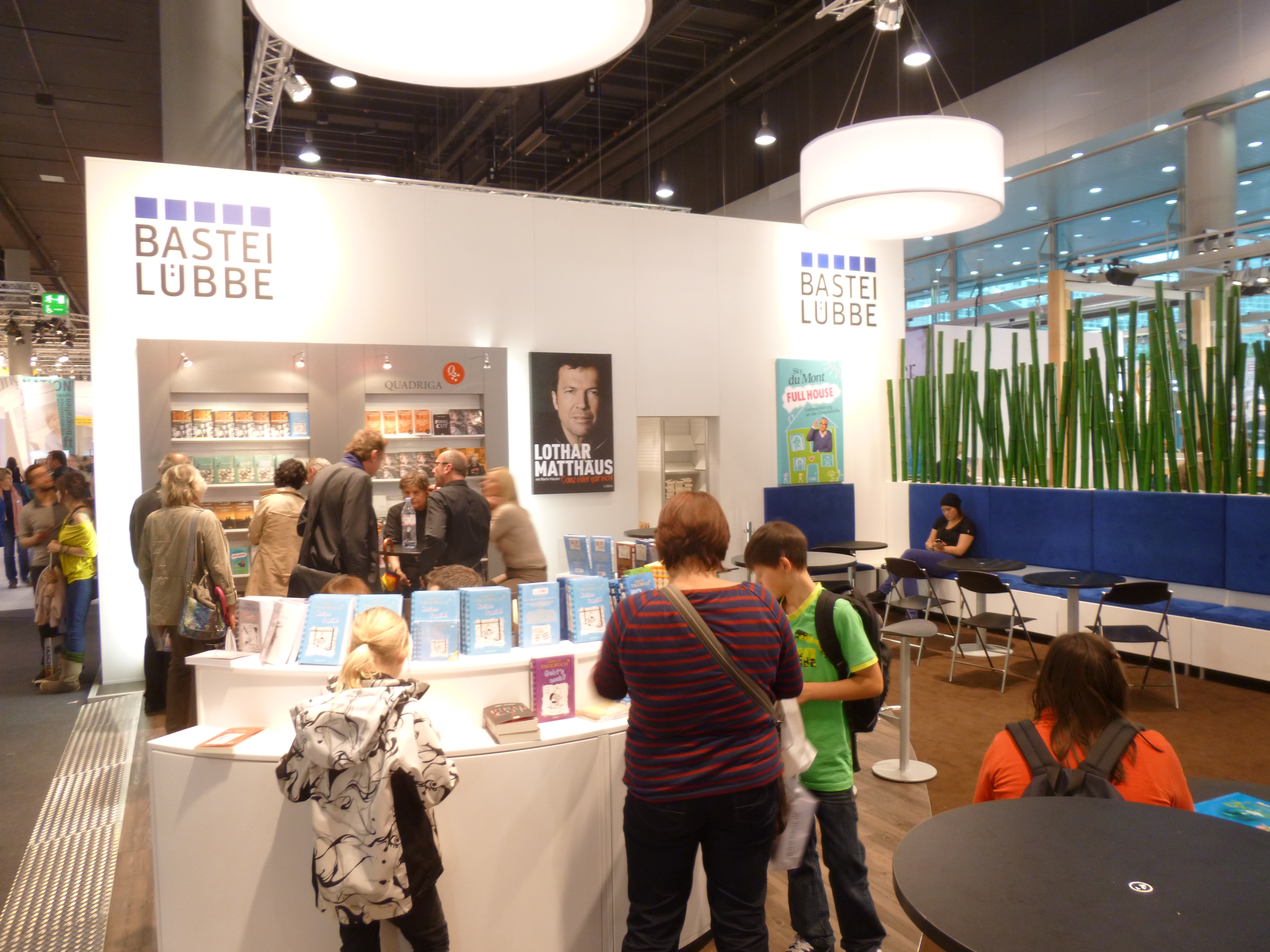 stando de la eldonejo x en la Frankfurta librofoiro 2012